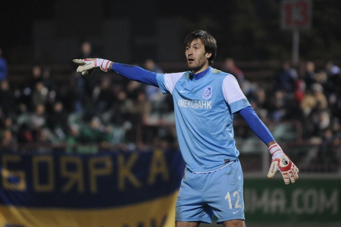 Дмитрий Безотосный